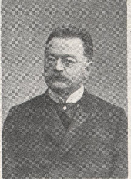 Julius Siben, Deidesheim, Zentrumspolitiker, katholischer Aktivist